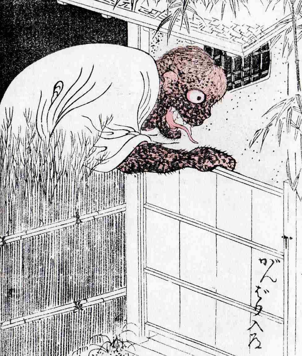 Kanbari-nyūdō (がんばり入道, a bathroom spirit) from the Rekkoku-kaidan-kikigaki-zōshi (列国怪談聞書帖)